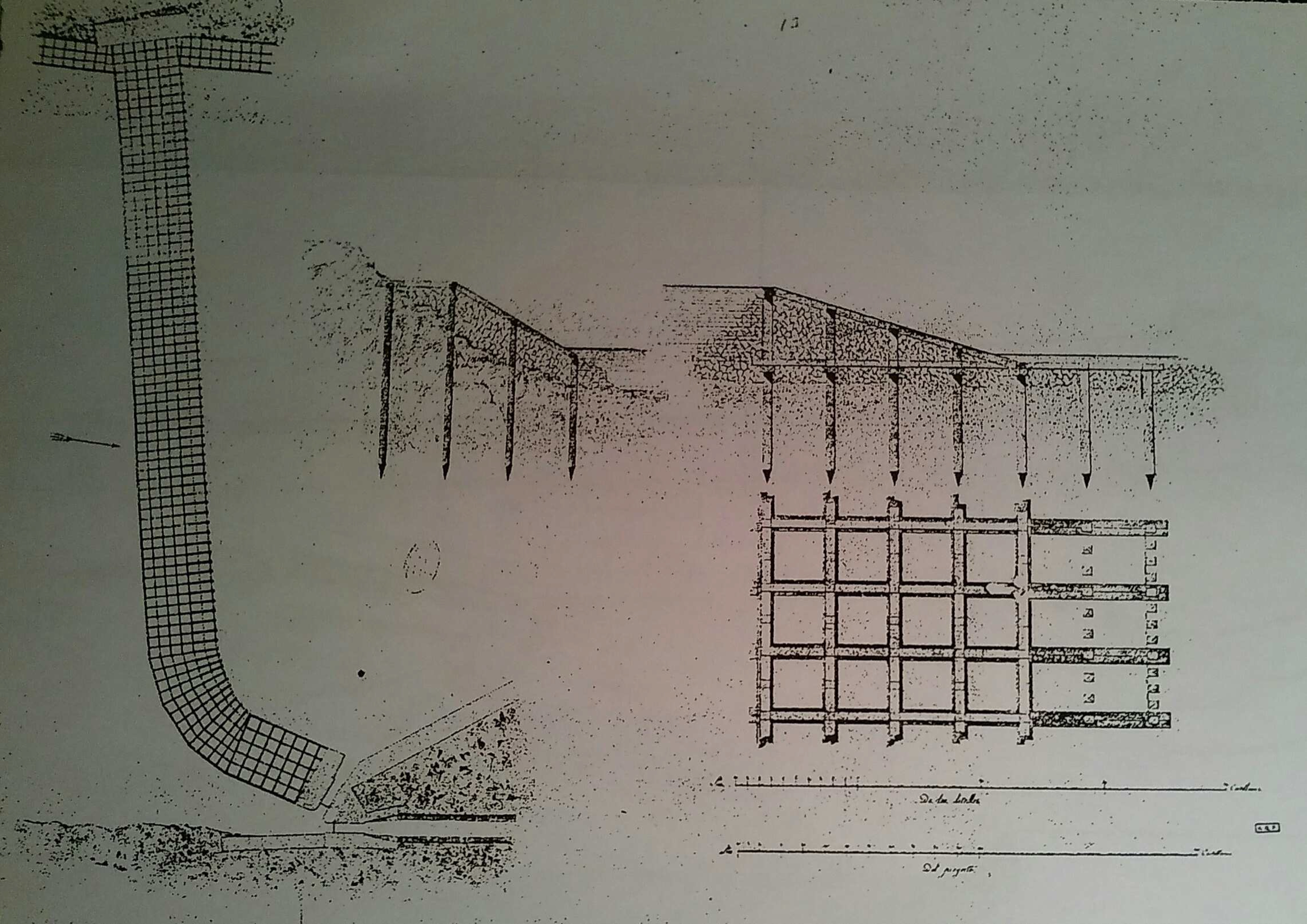 Plano nº 3.449